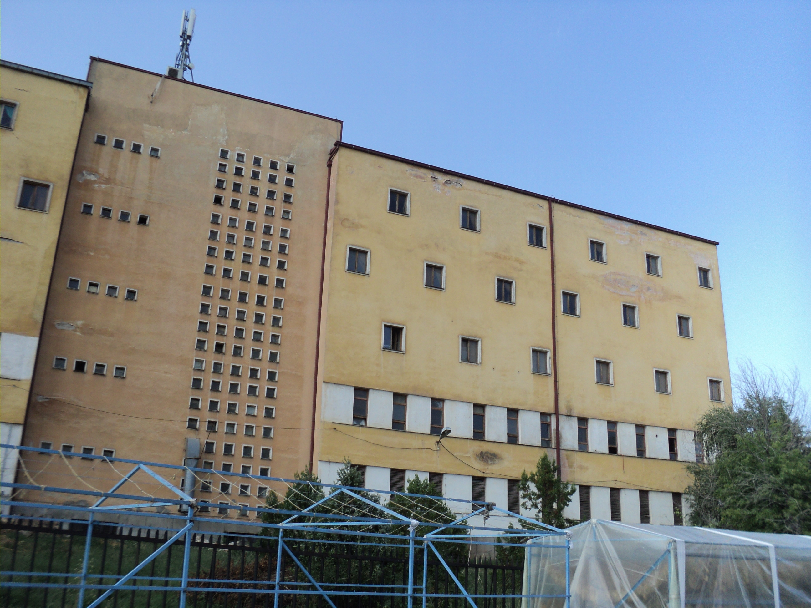 Srpski (latinica): Zgrada Tutunskog kombinata u Prilepu.